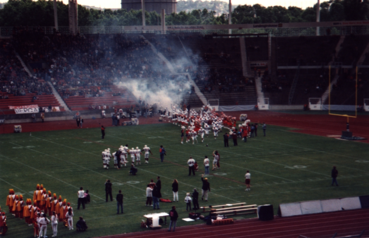 Das Team der London Olympians betritt den Rasen des Eurobowl VIII.